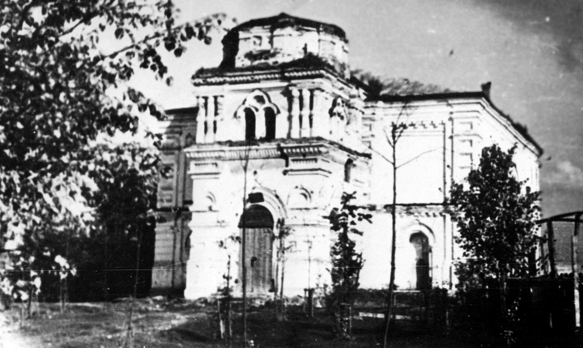 Беларуская (тарашкевіца): Лёзна (Lozna), вуліца Бабінавіцкая (vulica Babinavickaja). Царква па маскоўскай перабудове